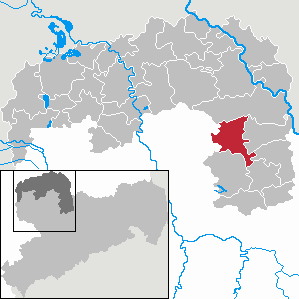 Dahlen in Saxony - Landkreis Nordsachsen